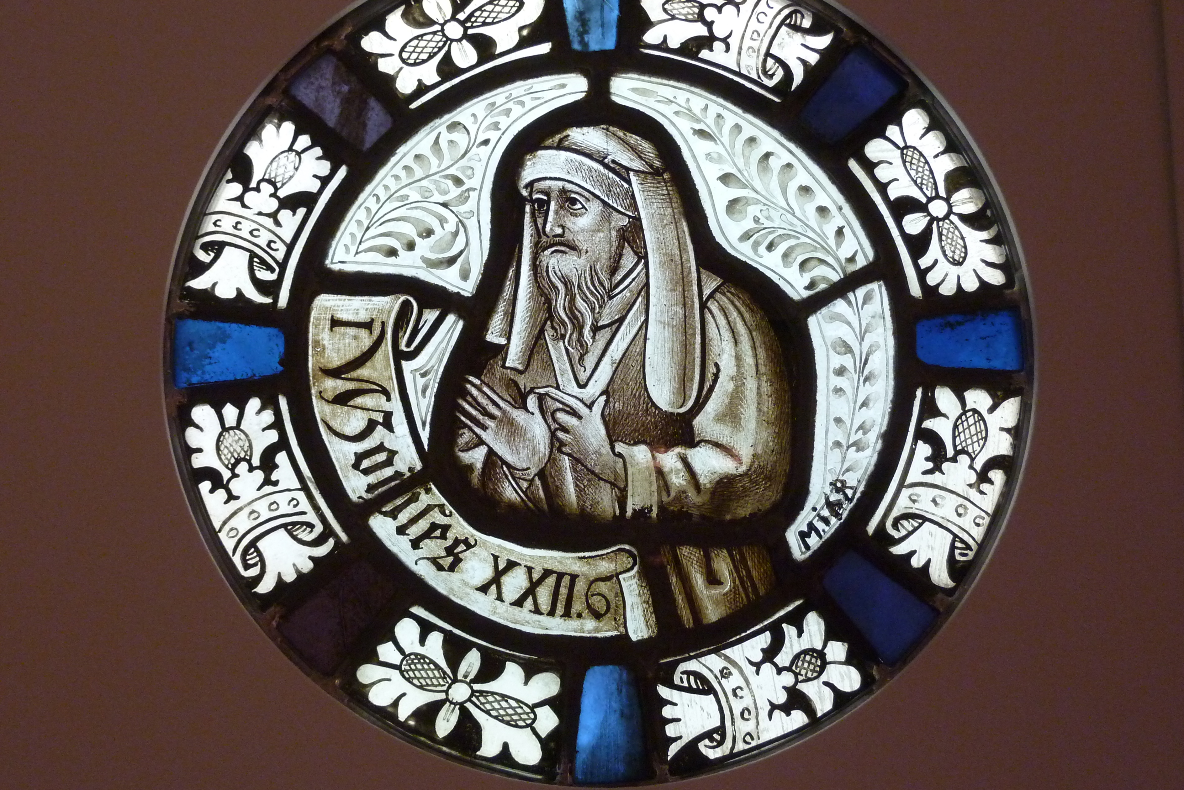 Rundscheibe mit Mosesbüste im Museum Schnütgen in Köln, Köln um 1420, Inventar-Nr.: M 168, siehe Brigitte Lymant: Die Glasmalereien des Schnütgen-Museums. Schnütgen-Museum, Köln 1983